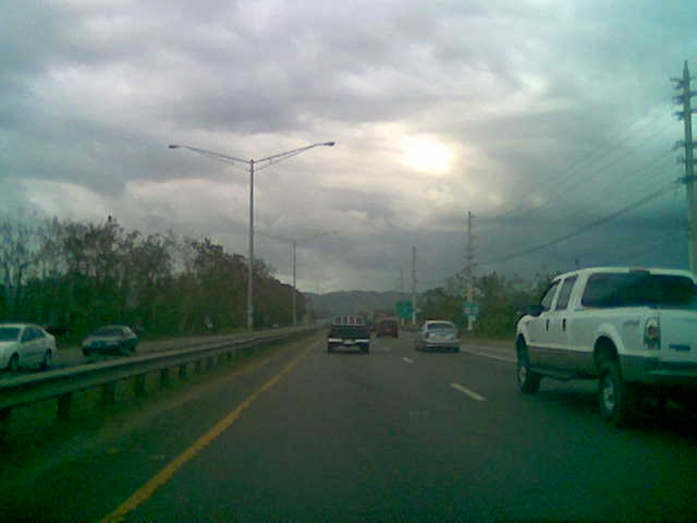 PR-2 Mayaguez